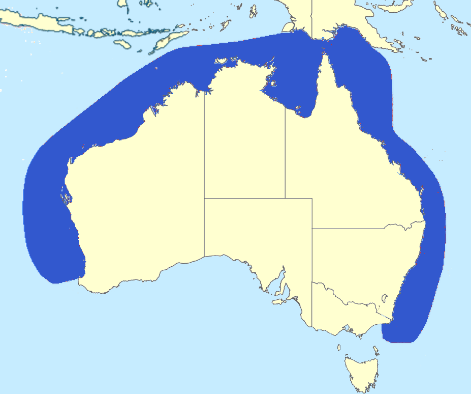 Ареал цибиосарды стройной